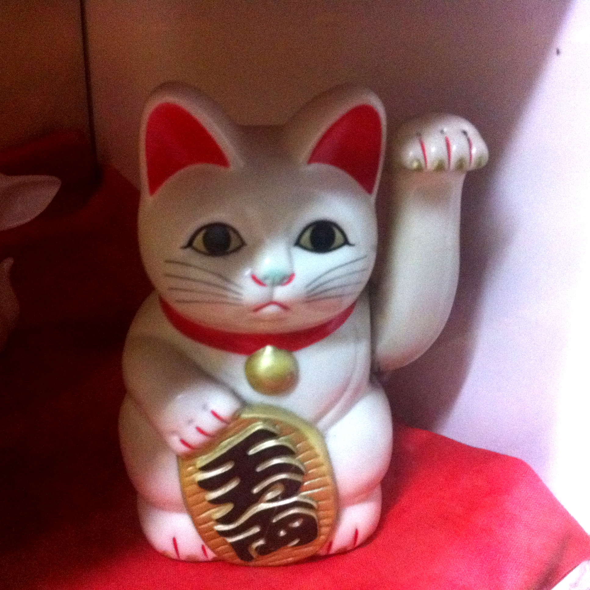 招き猫 (Lucky cat, maneki-neko)